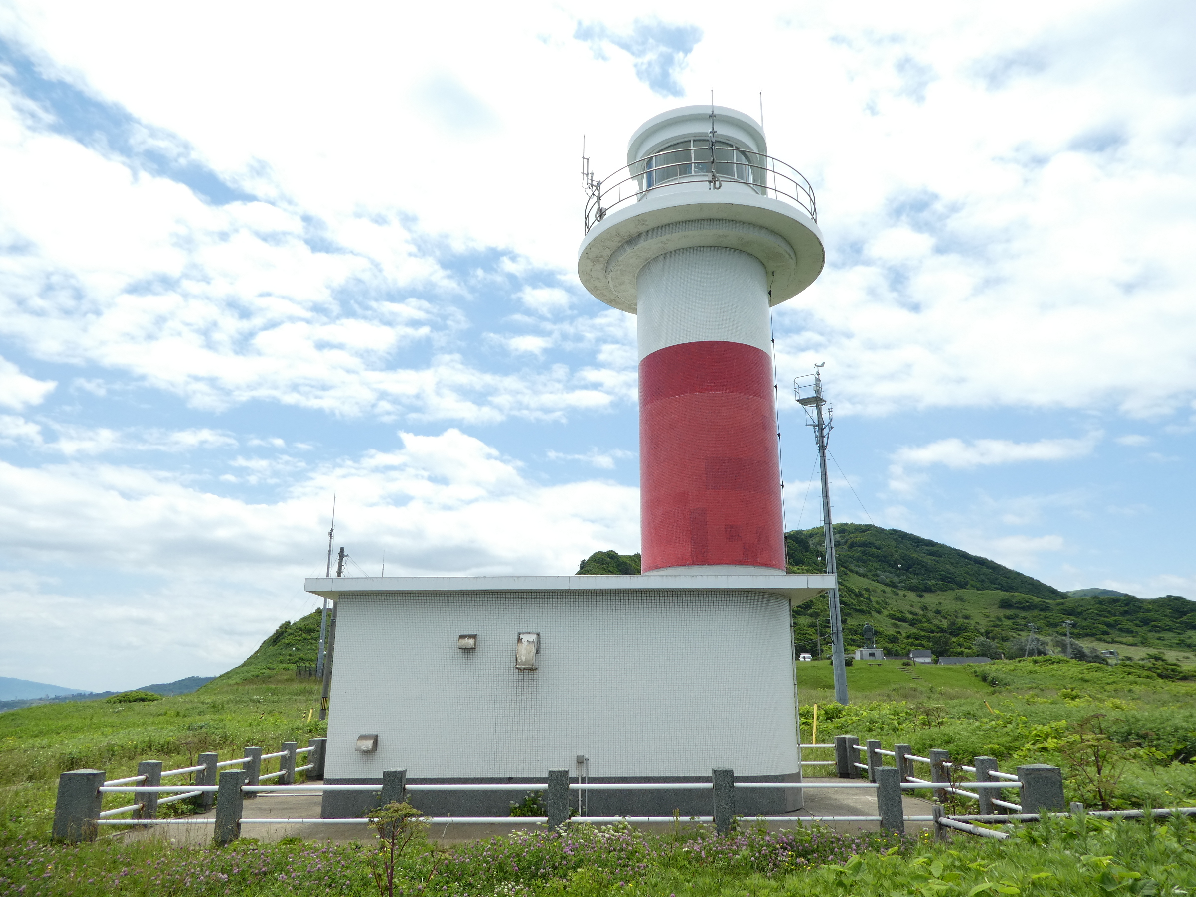 北海道寿都郡寿都町に建つ弁慶岬灯台。